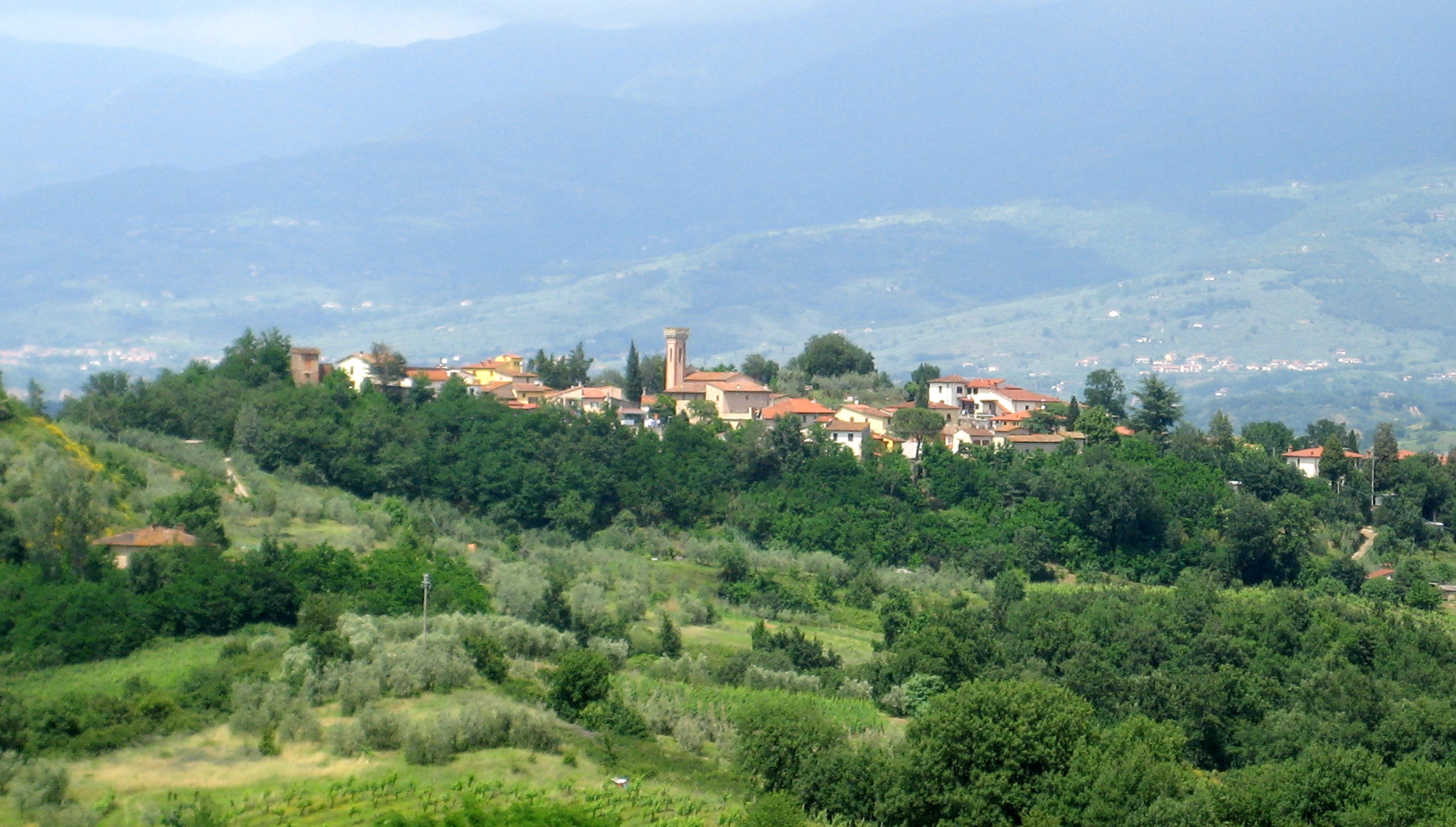 Blick auf den Ortsteil Ricasoli der Gemeinde Montevardi, Chianti, Toskana, Italien